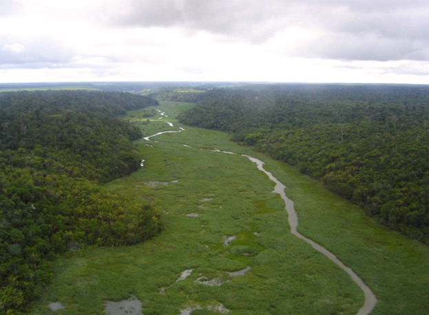 Fotografia aérea de um trecho do Rio Preto tirada durante operação de monitoramento da Floresta Nacional Rio Preto, realizada no dia 03/11/2008 - Conceição da Barra/ES.